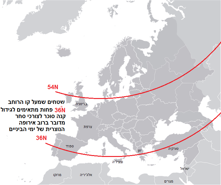 שטחים באירופה ואגן הים התיכון בעלי פוטנציאל לגידול קנה סוכר לצורכי סחר